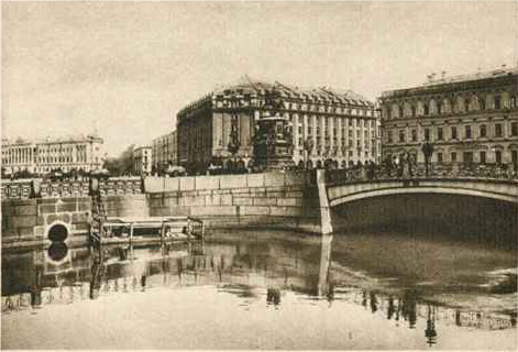 Открытка с видом Синего моста через реку Мойку в Санкт-Петербурге.